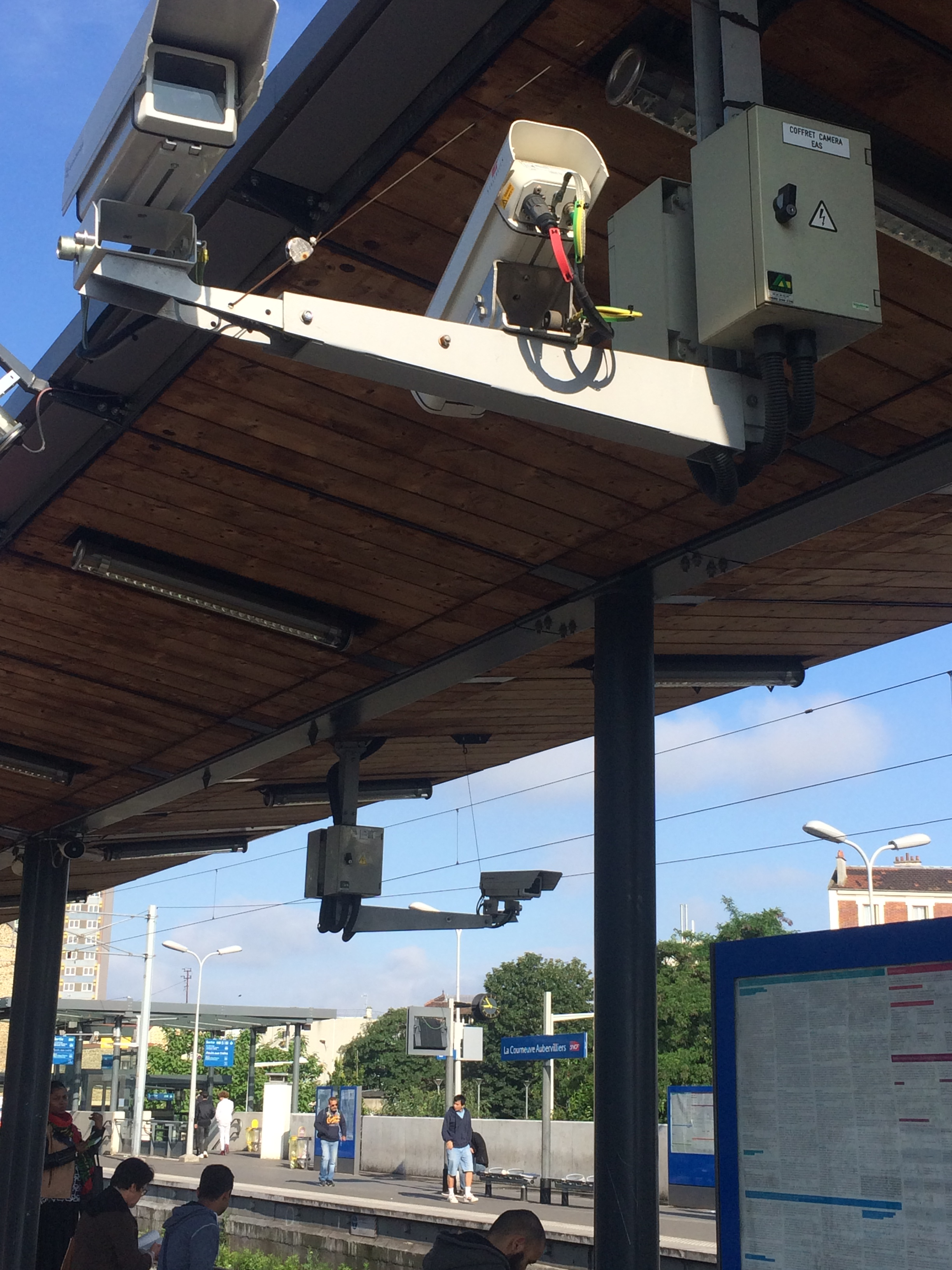 Caméras de surveillance sur les quais de la gare de La Courneuve - Aubervilliers